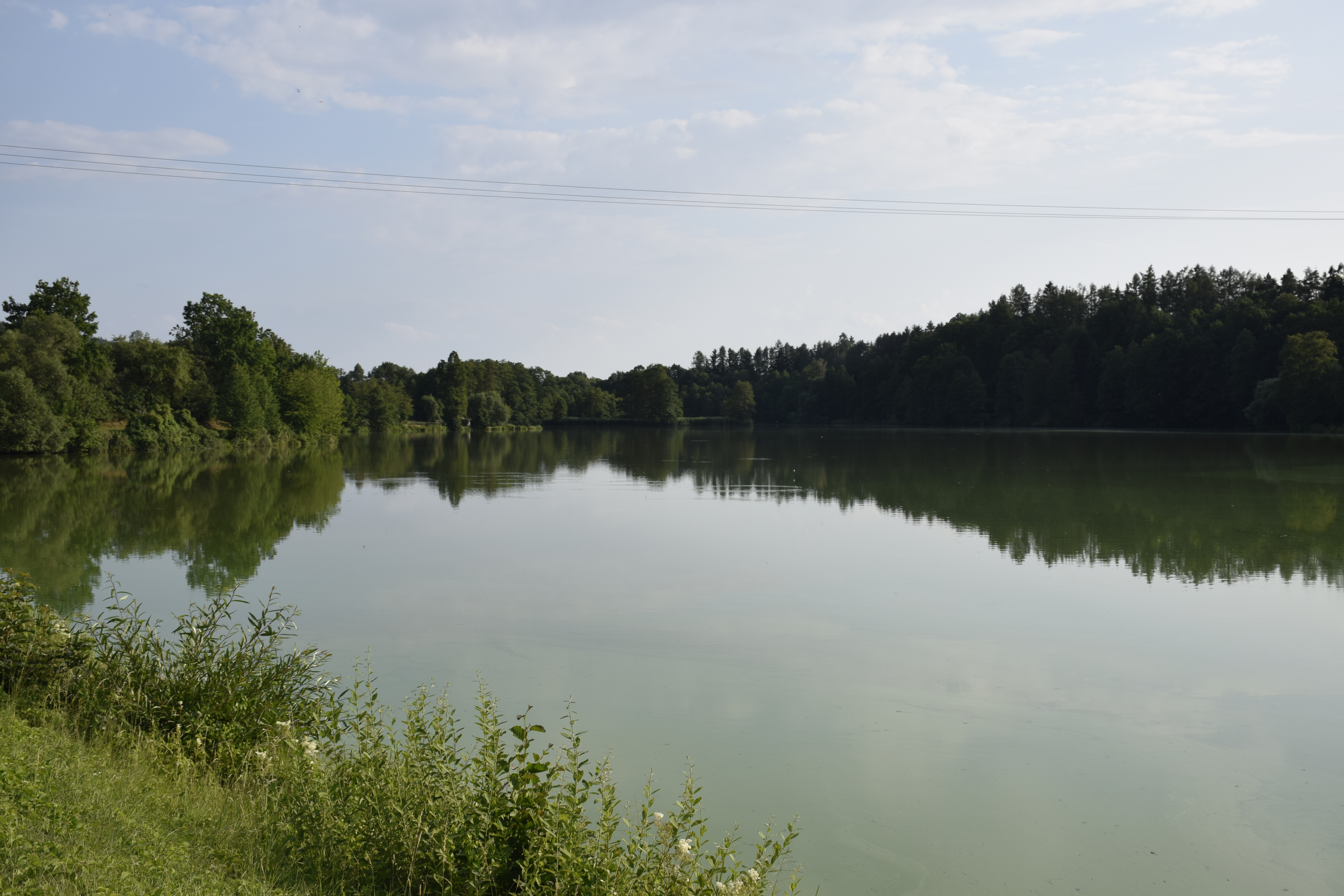 Kamberk. Česká republika.